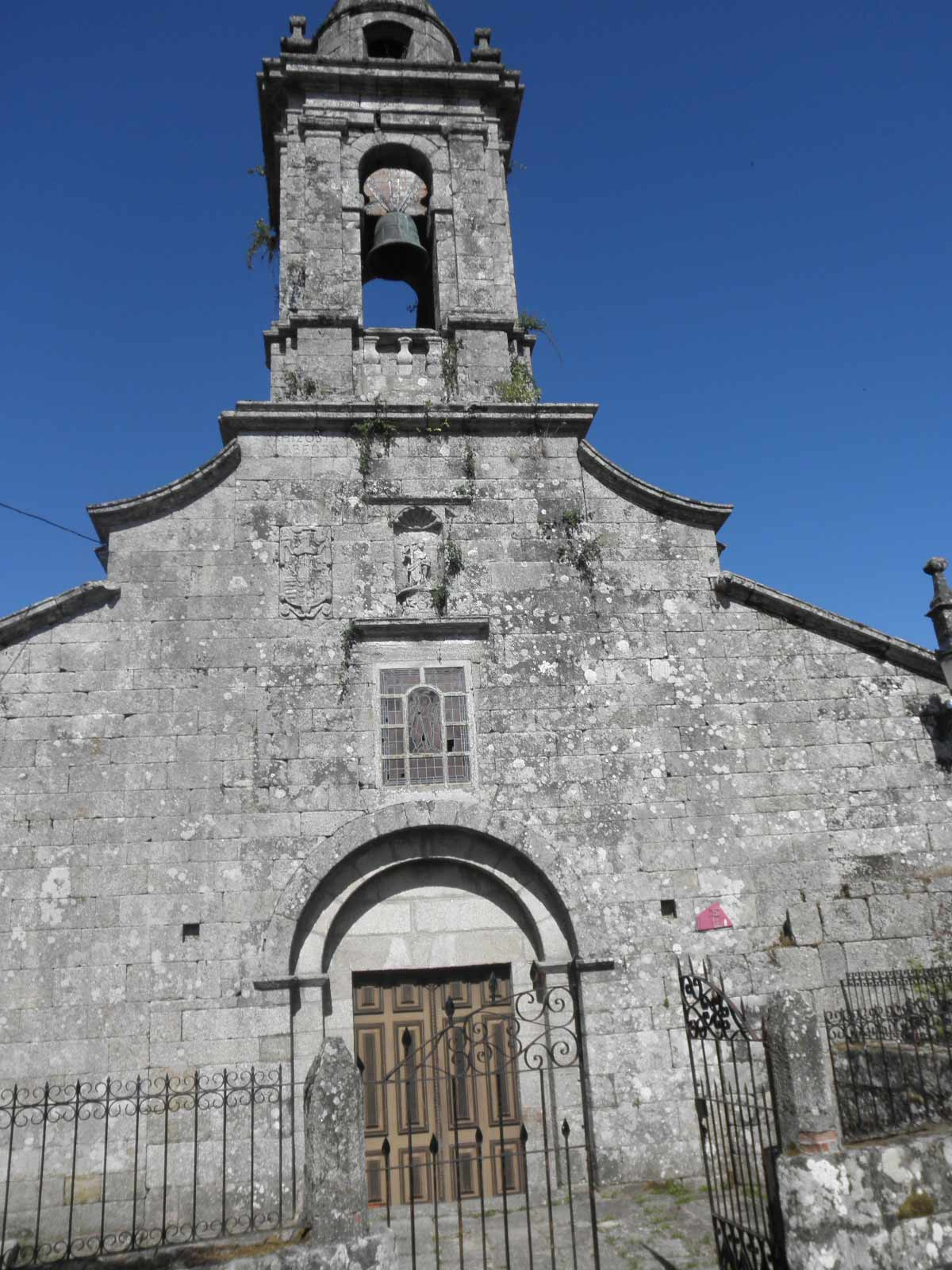 Iglesia San Xoan de Rio. Entorno O Reboledo (Ourense)